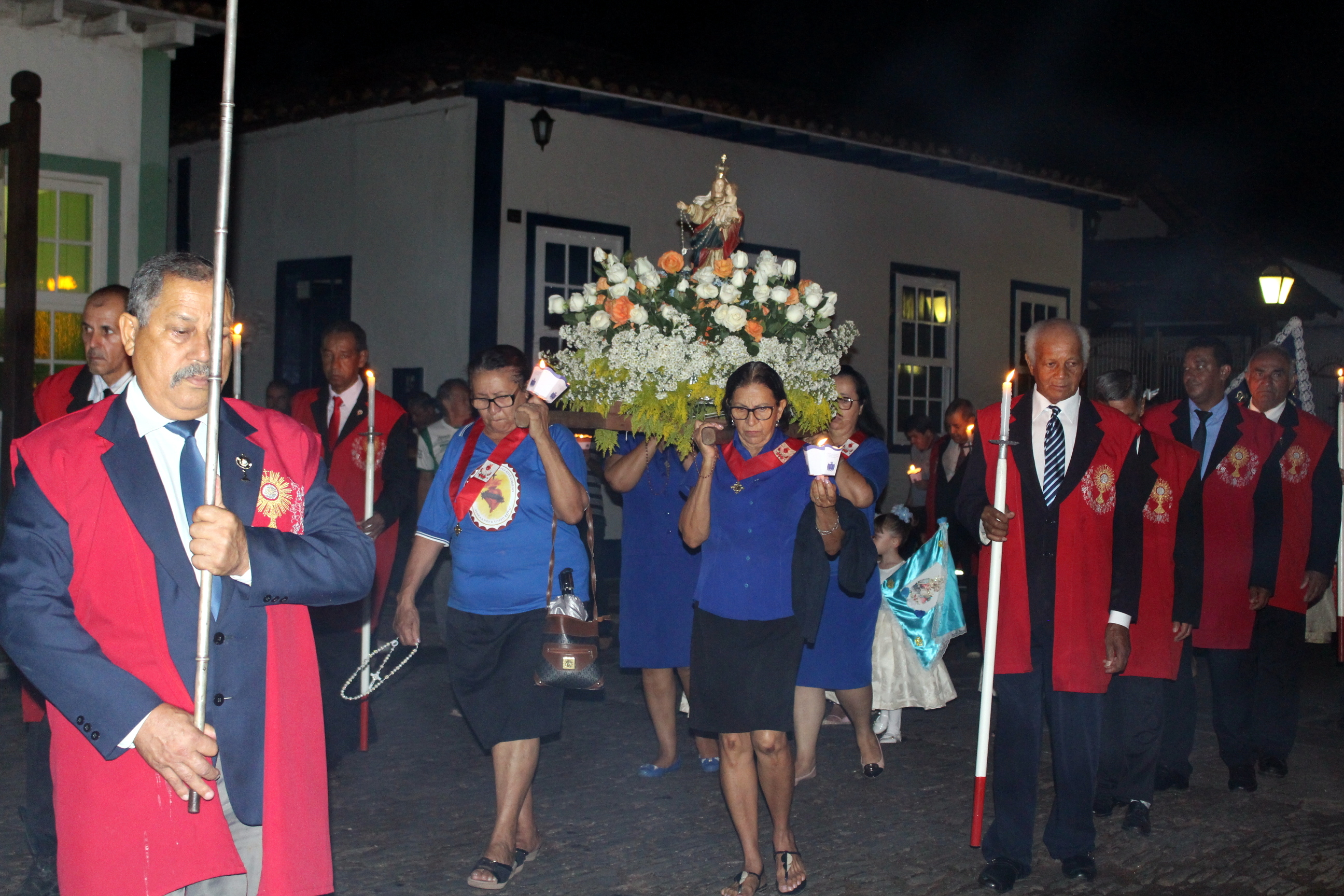 Procissão de Nossa Senhora do Rosário em Pirenópolis. No itinerário a imagem é conduzida pelo Apostolado da Oração, ladeados pela Venerável Irmandade do Santíssimo Sacramento.